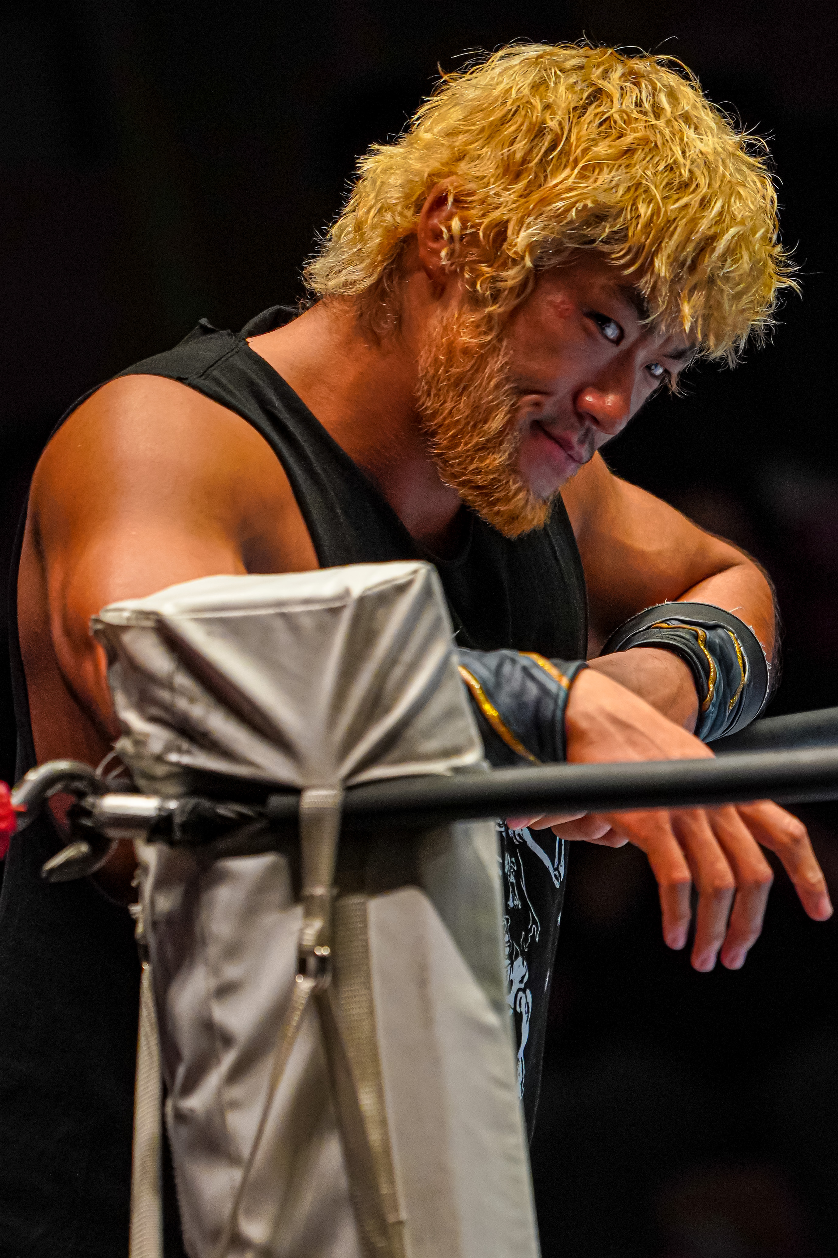 2019.10.17 後楽園ホール